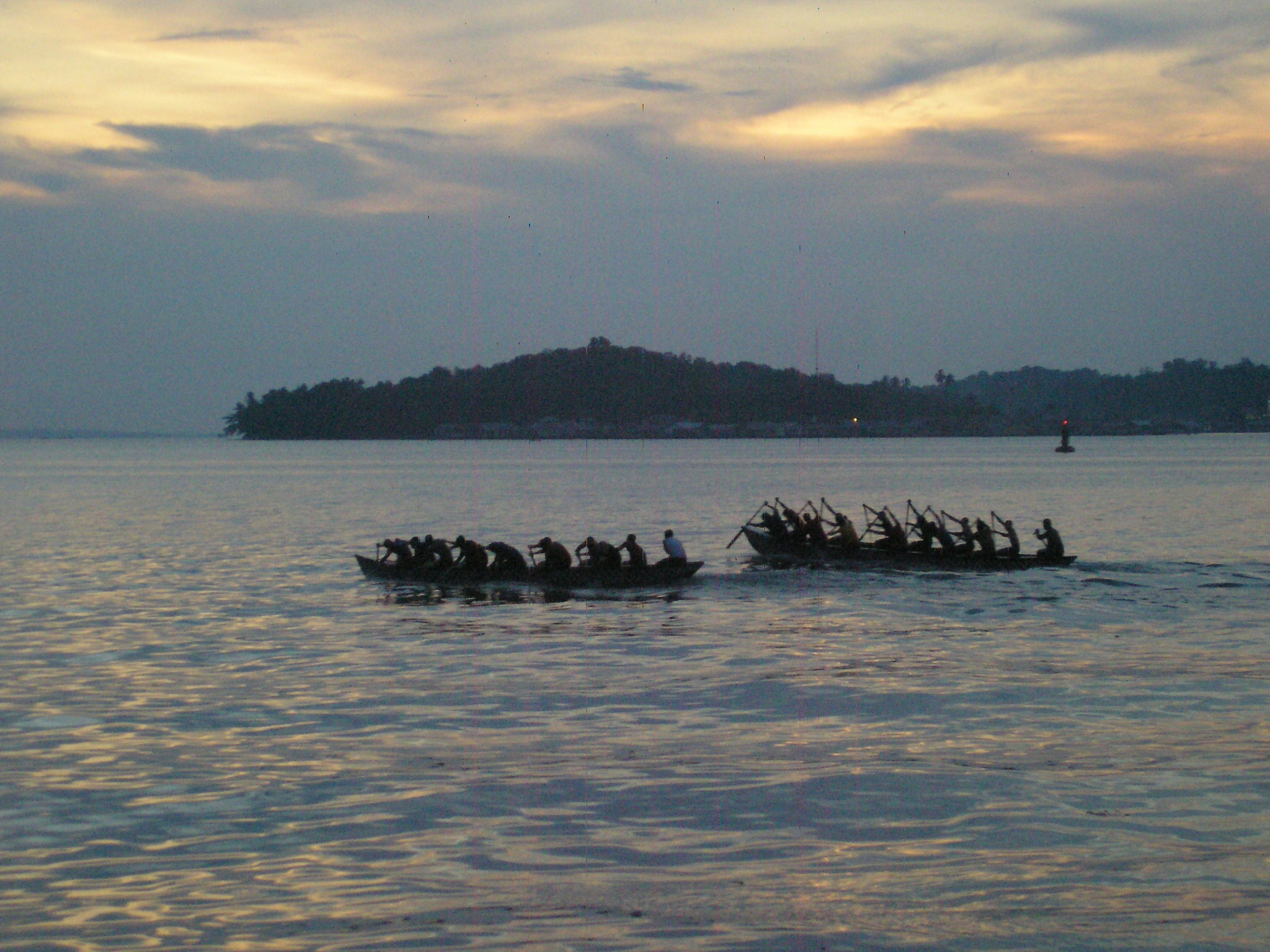 Boat race in Tanjung Pinang